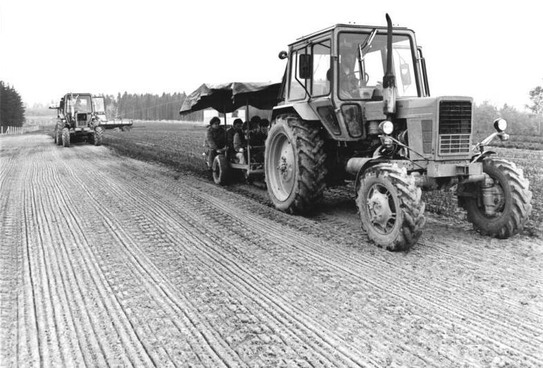 Zillbach, Baumschule, Anpflanzen ADN-ZB Schaar 7.5.1987 Bez. Suhl: Thüringer Wald- Um den Thüringer Wald als Erholungsgebiet, Wasserspeicher, Rohholzlieferant, als ausgedehntes Weide- und Grünland oder als Schutzgebiet für Tiere und Pflanzen zu erhalten, müssen neue Bäume gepflanzt werden. Die Forstbaumschule Zillbach liefert zur Aufforstung der Wälder des Bezirkes Suhl 1987 über 5,6 Millionen Pflanzen. - siehe auch 25, 26 N sowie ADN-Meldung